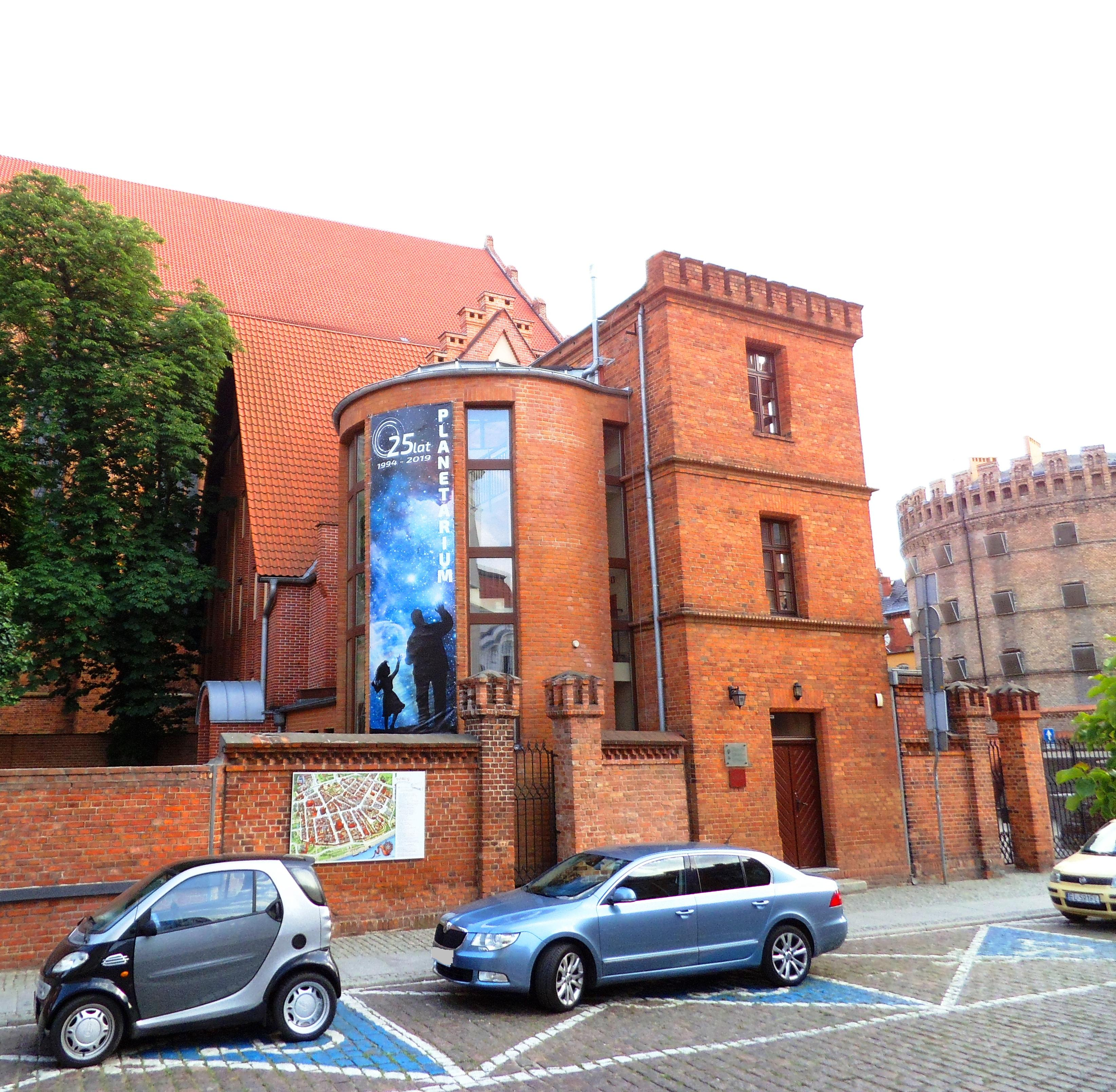 Budynek Orbitarium w Toruniu1